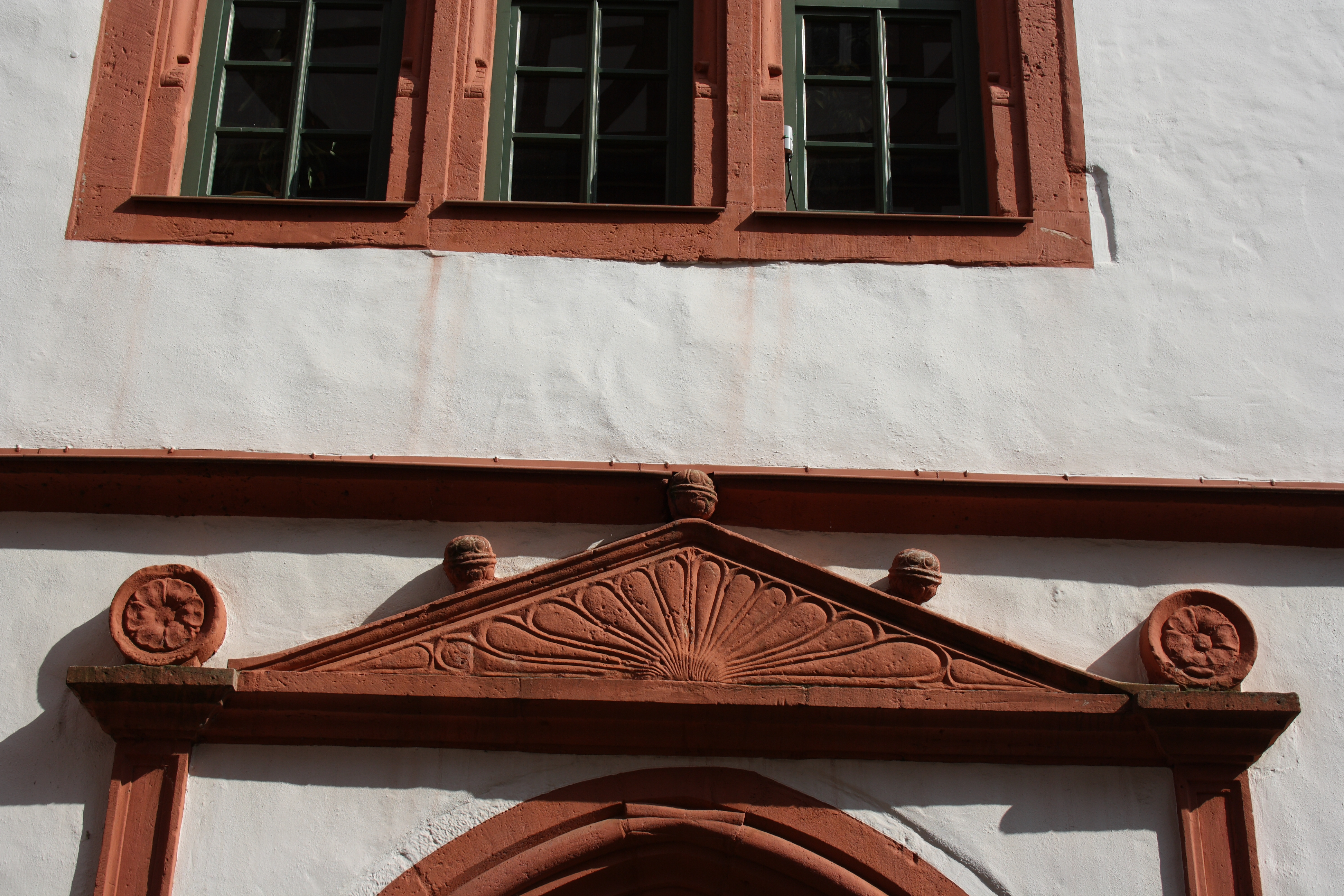 Hochzeitshaus in Alsfedl im Volgelsbergkreis (Hessen), Marktplatz 7